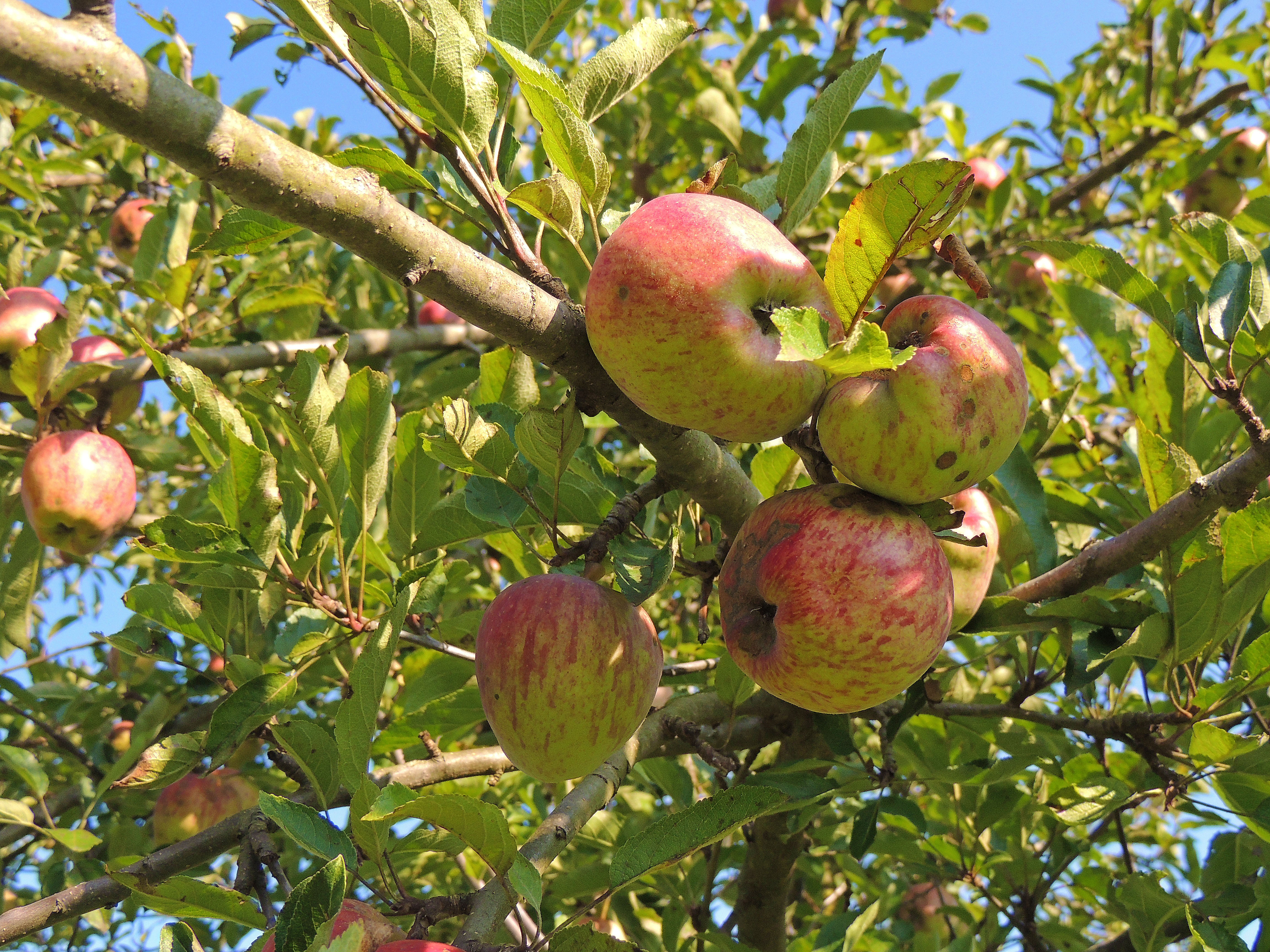 Variété ancienne originaire du Bas-Rhin.